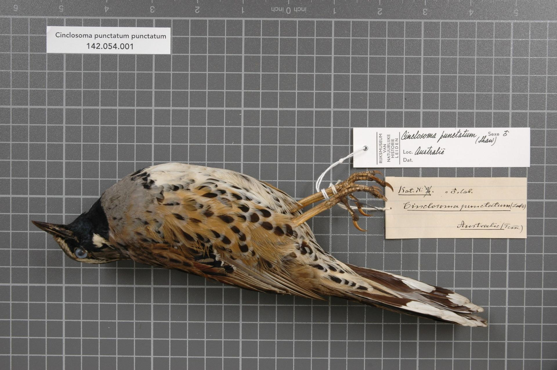 Cinclosoma punctatum punctatum (Shaw, 1794)